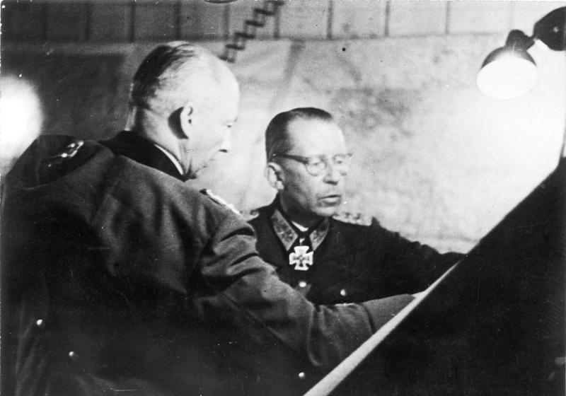 Eichenlaubträger Generalfeldmarschall von Kluge bei einer Einsatzbesprechnung mit Generaloberst Heinrici, Oberbefehlshaber einer Armee. PK Bergmann [herausgegeben September 1943]